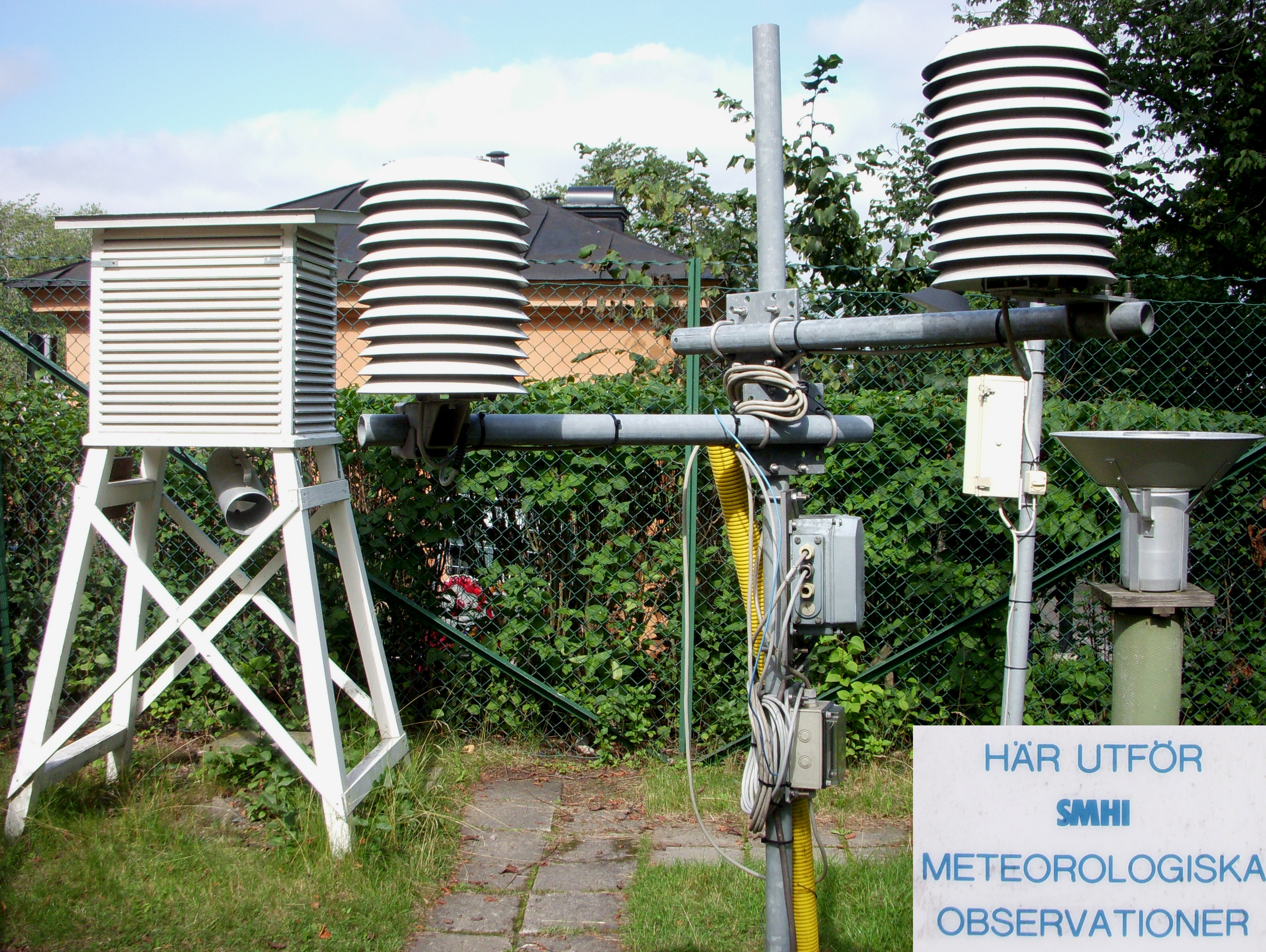 SMHI:s väderstation på Observatoriekullen i Stockholm